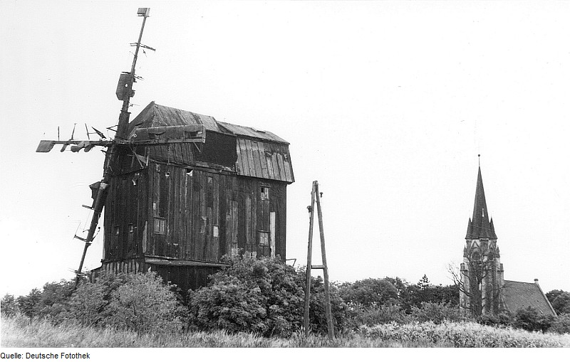 Original image description from the Deutsche FotothekBottmersdorf-Klein Germersleben. Paltrockmühle, Baujahr 1949 (1848 in Seehausen als Bockmühle erbaut, 1949 Umsetzung und Umbau)